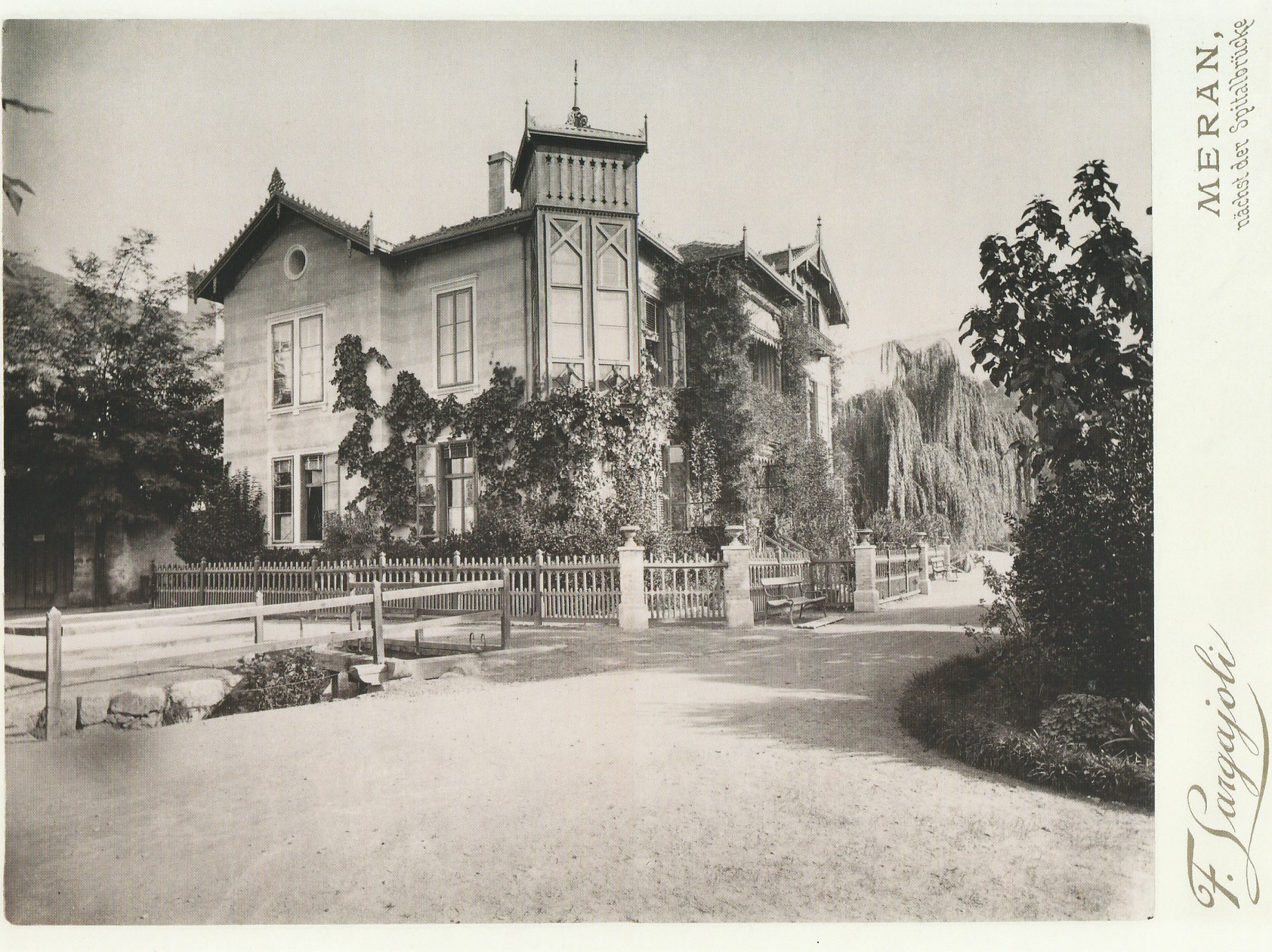 Villa Fanny in Meran